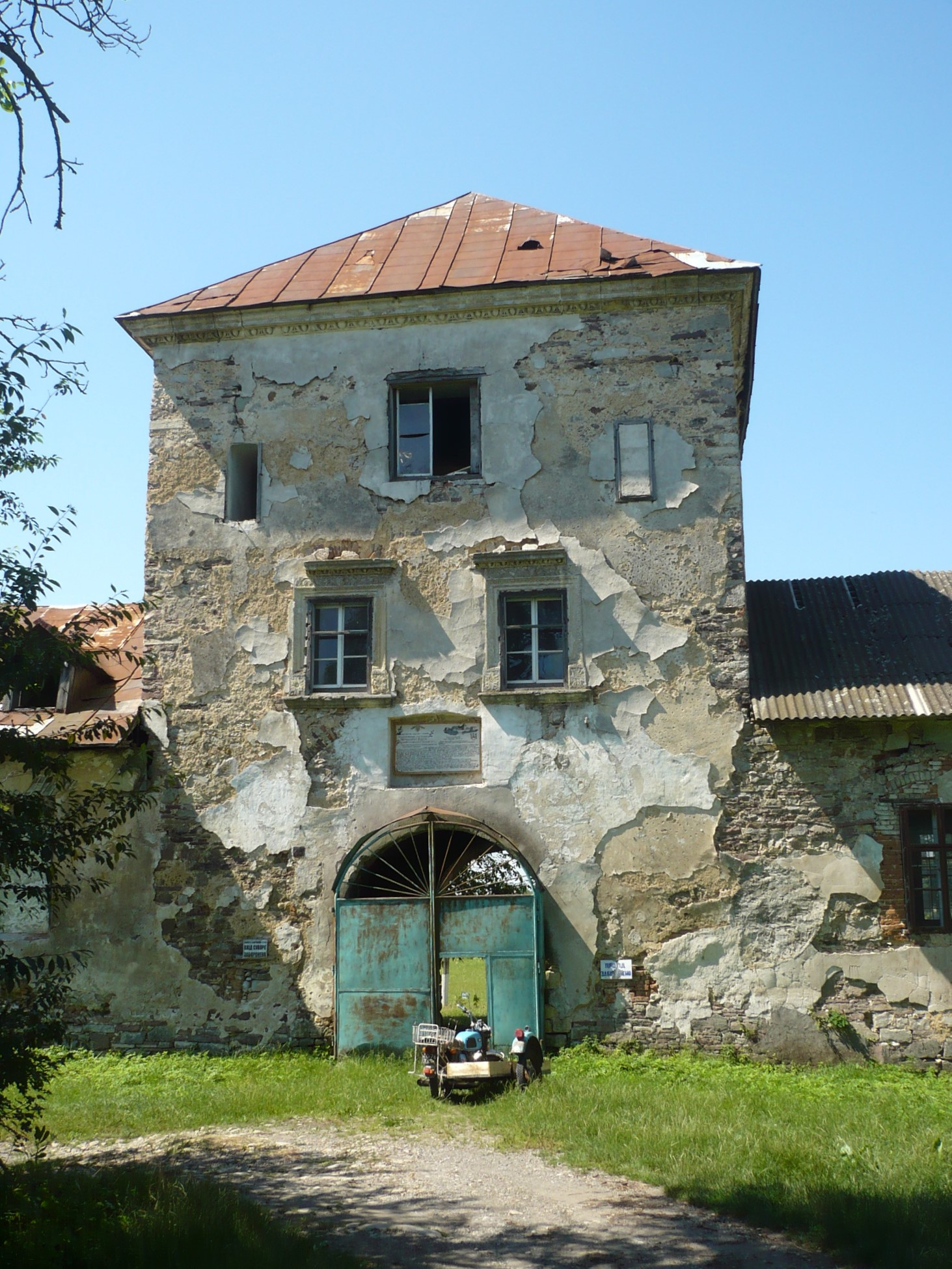 Potok Złoty. Zamek